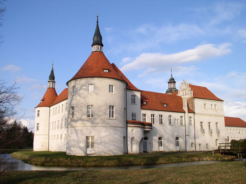 Schloss Fürstlich Drehna, Blick von Südwesten